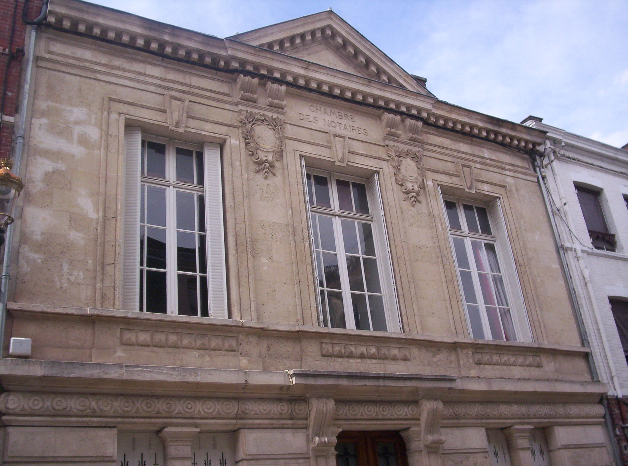 immeuble - rue des berceaux - Épernay